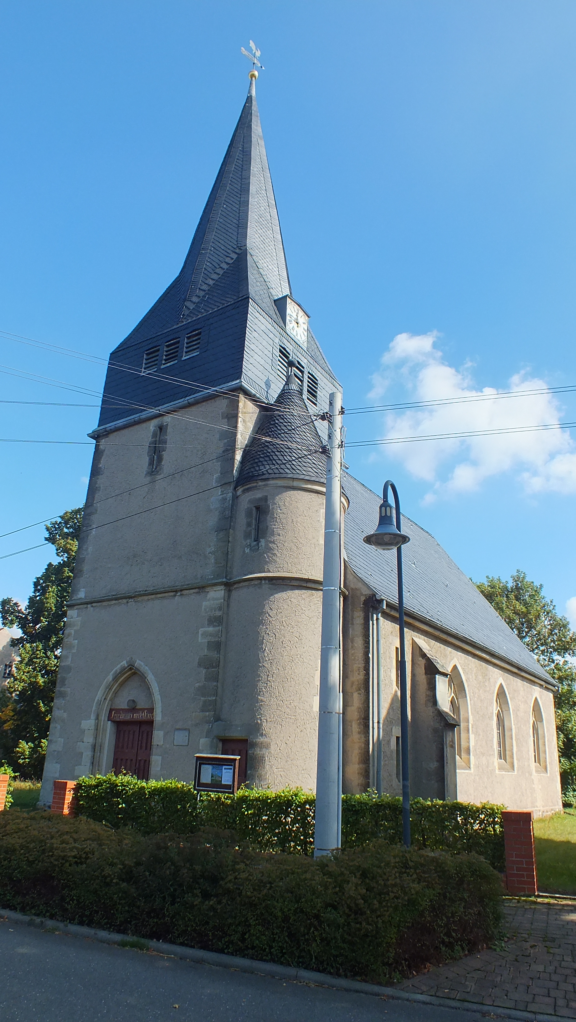 Saalkirche in Bethau (Annaburg)